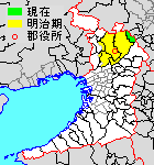 大阪府三島郡の範囲